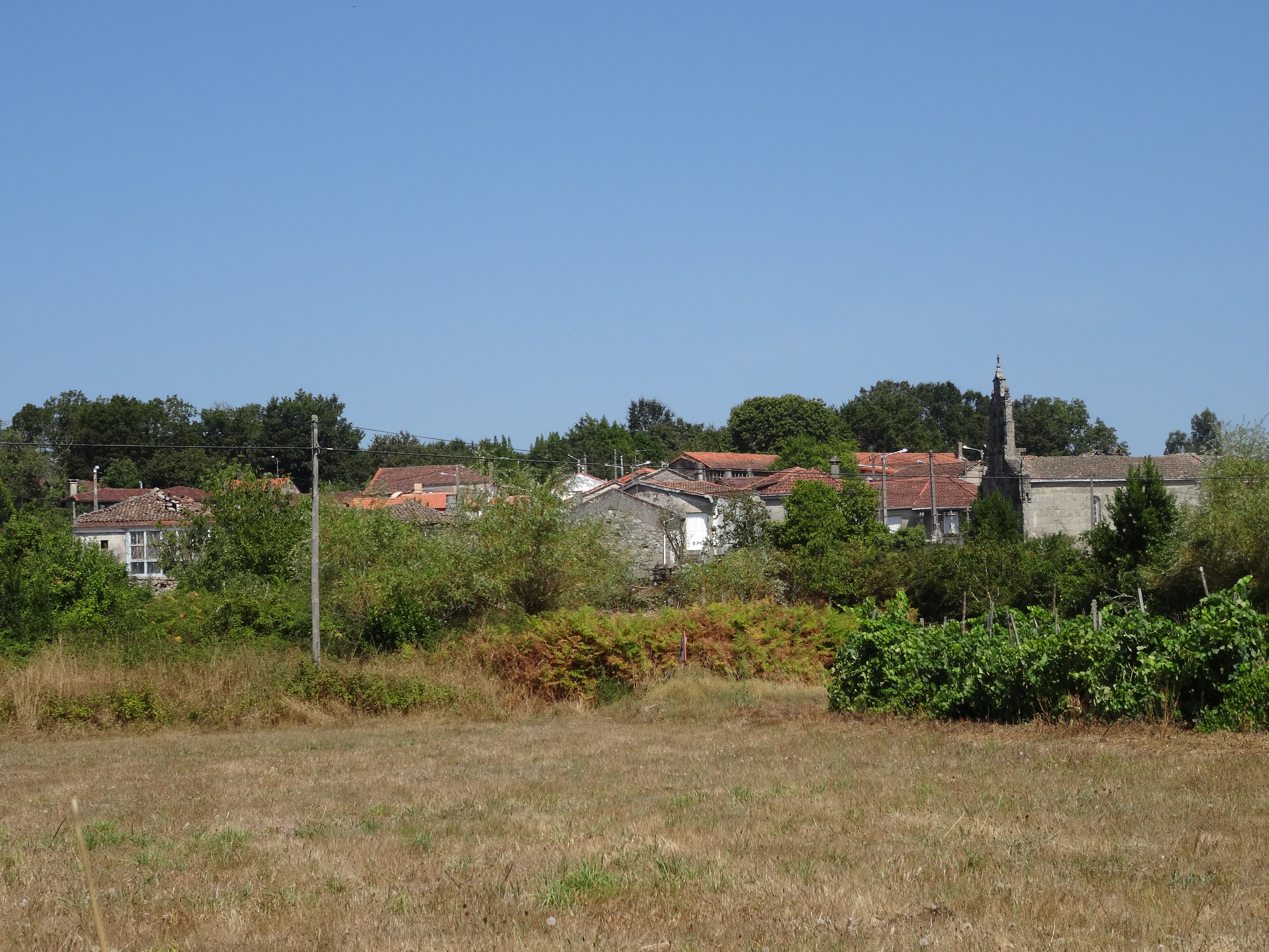 Ver título.